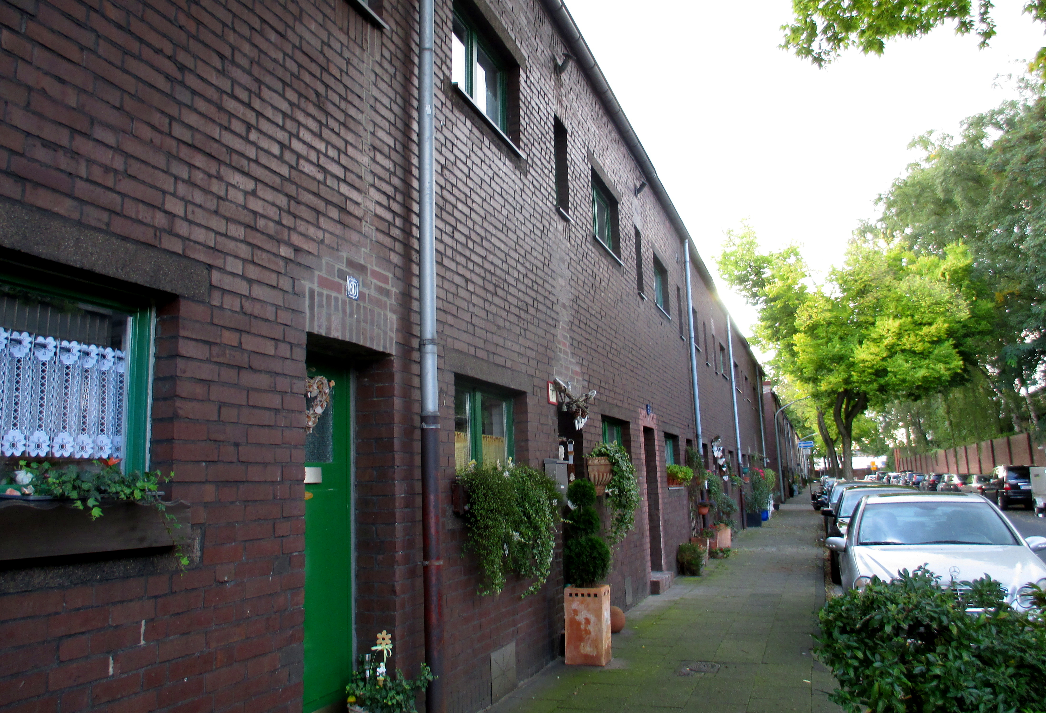 Die Dickelsbachsiedlung in Duisburg-Wanheimerort entstand zwischen 1925 und 1927. Sie ist die erste der vier Typenhaussiedlungen in Duisburg. Benannt wurde sie nach dem südlich vorbeifließenden Dickelsbach. Entworfen wurde sie von den Architekten Heinrich Bähr und Hermann Brauhäuser.This is a photograph of an architectural monument.